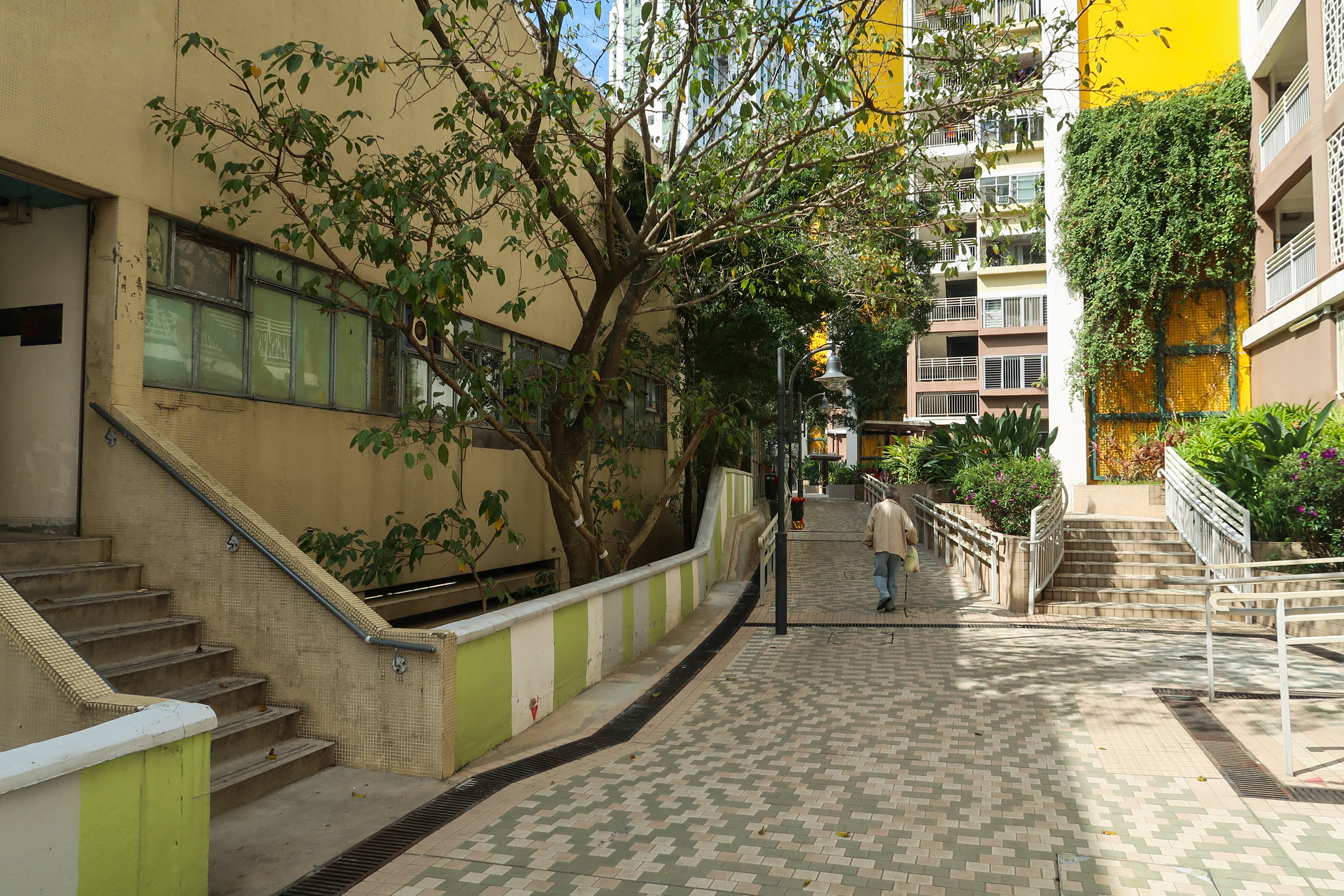 Ming Wah Dai Ha